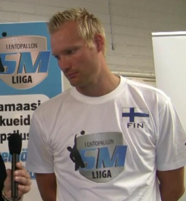 Ilkka Sammelvuo